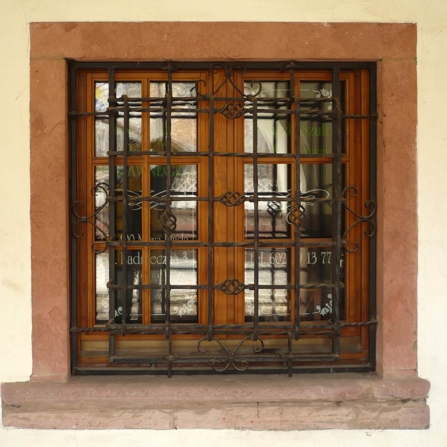 Nowa Ruda, ul. Nadrzeczna 3 - okno domu tkaczy, XVIII/XIX w., przebud. w XX w. (zabytek nr A/942/1566 z 16.03.1966)